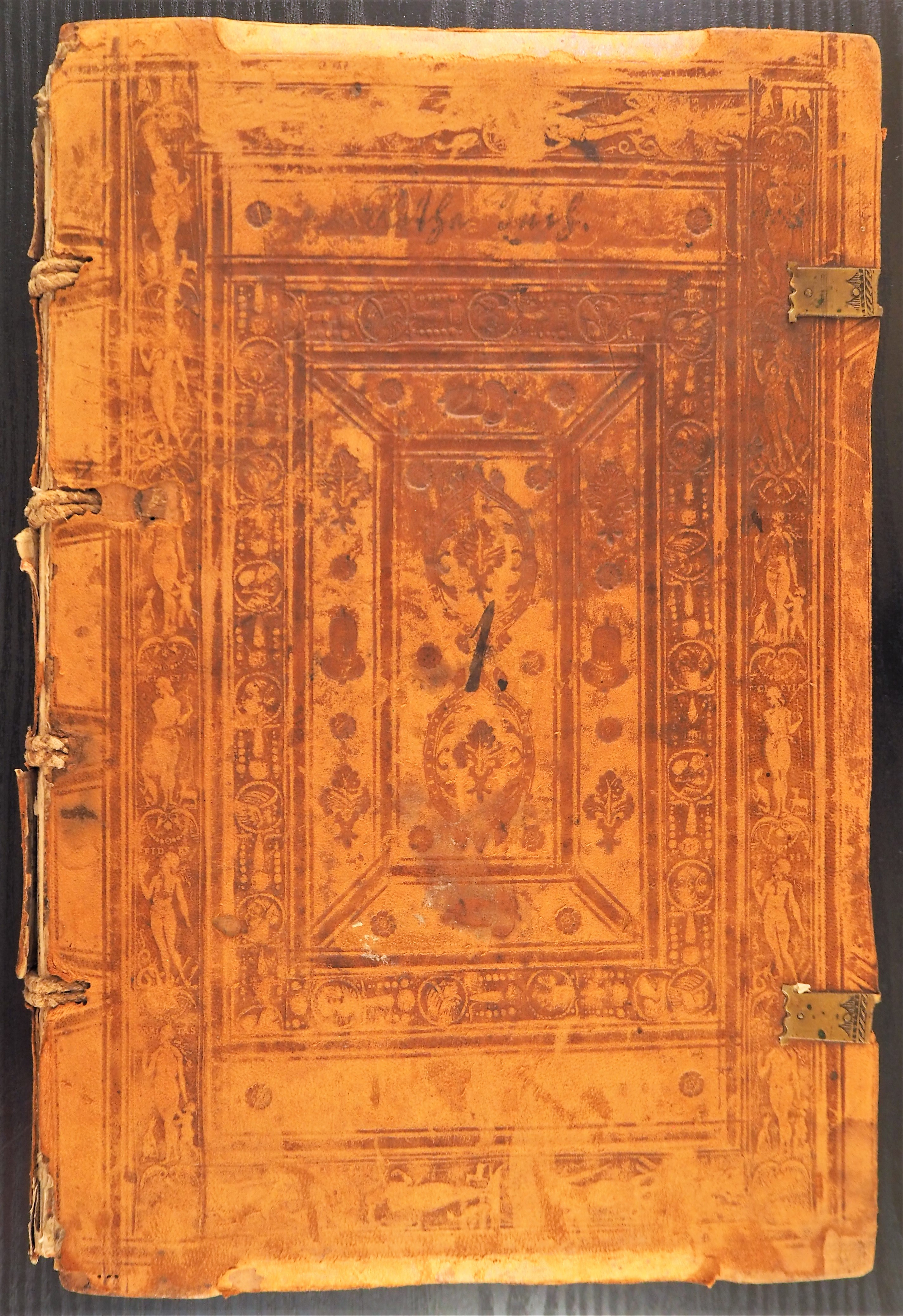 Rotes Buch, 1549 Staatsarchiv Bern, A I 52